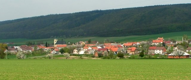 Panorama Stařechovice